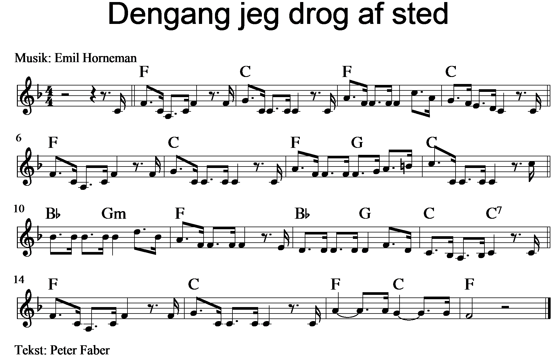 Dengang jeg drog af sted.